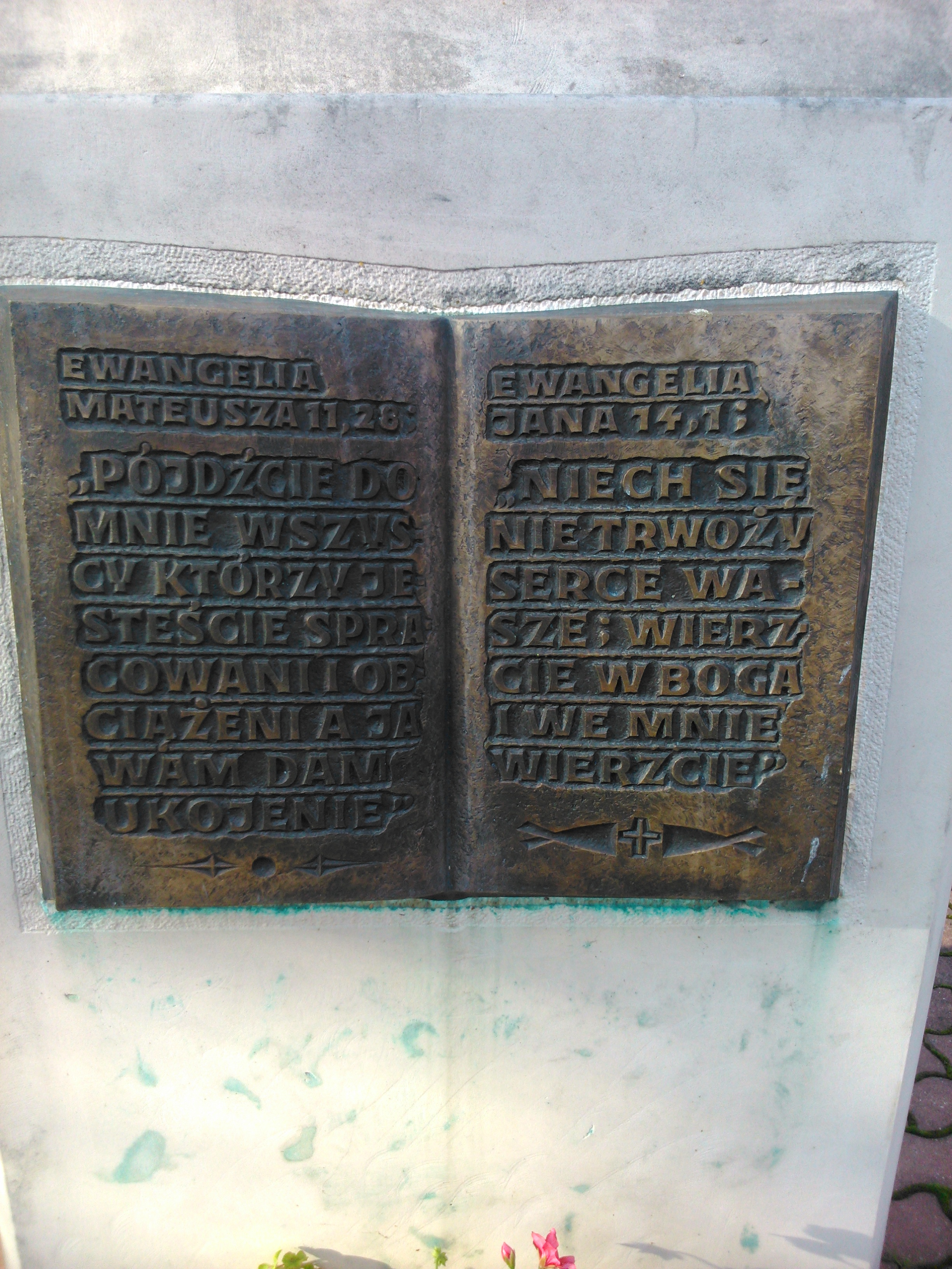 Tekst Biblijny